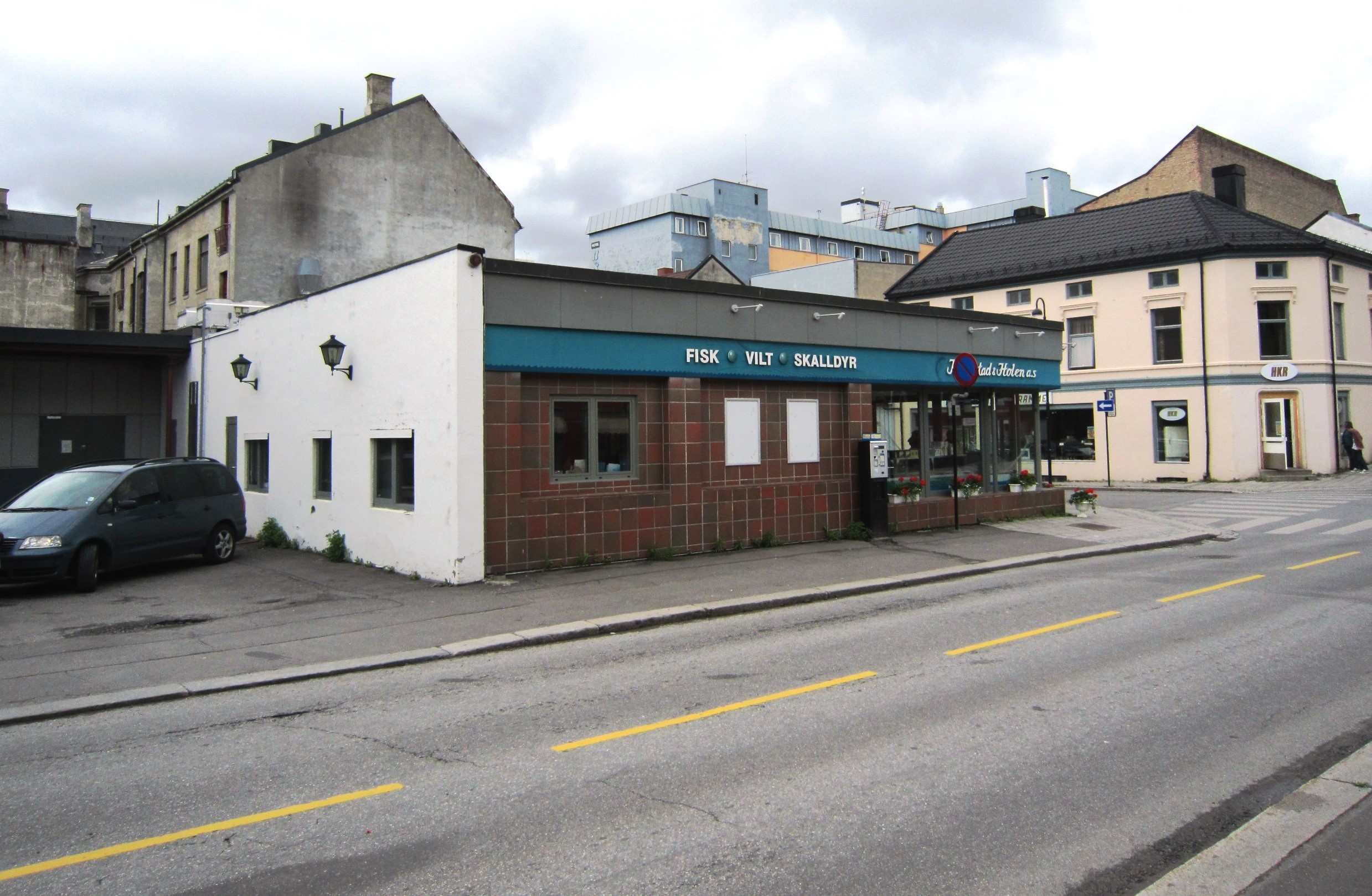 Grønnegata på Hamar (FV223, tidl. 75) går forbi fiskebutikken Knutstad & Holen